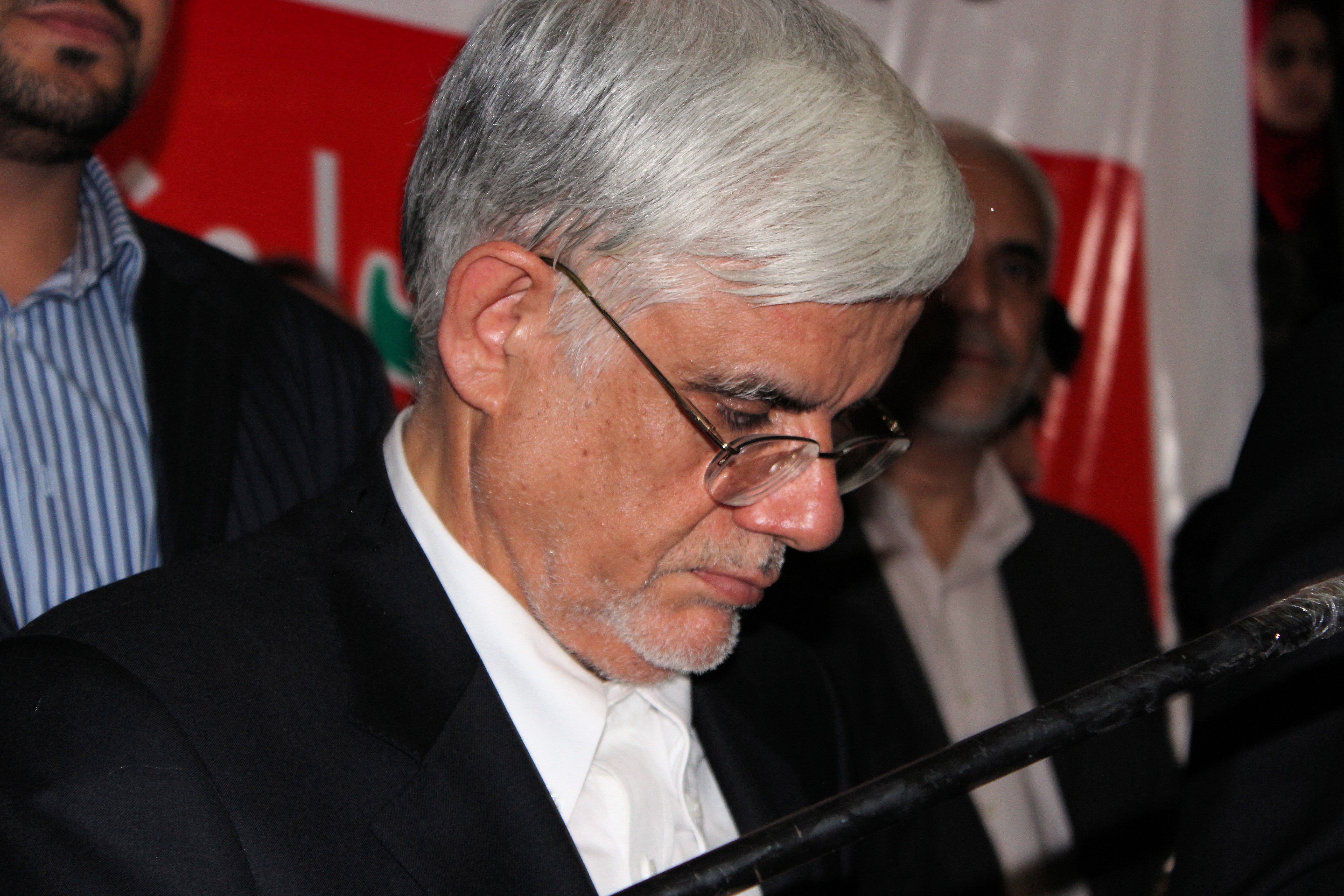 دکتر محمدرضا عارف در سفر انتخاباتی مشهد تاریخ ۱۸ خرداد ۱۳۹۲